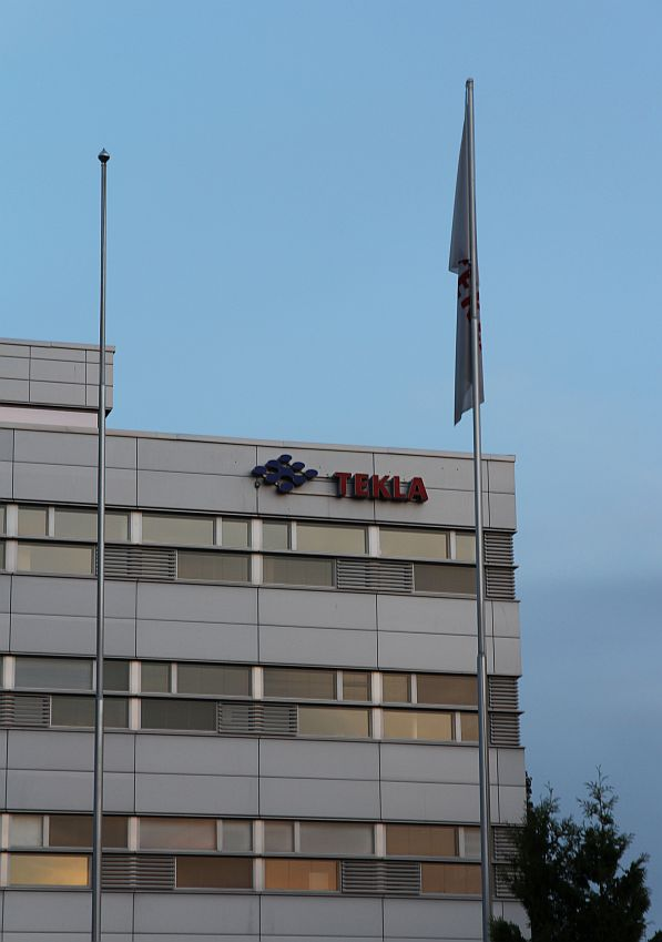 Ohjelmistoyritys Teklan pääkonttoria Espoon Pohjois-Tapiolassa. Huom: Muista säilyttää viittaus kuvaajaan, mikäli käytät kuvaa.